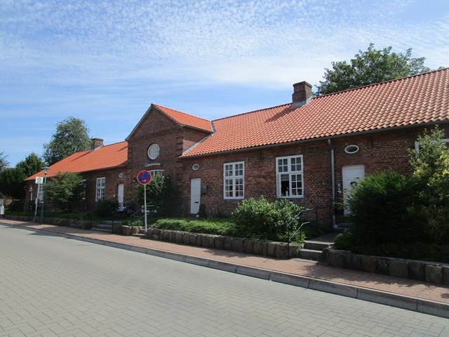 Clementshus i Bredsted